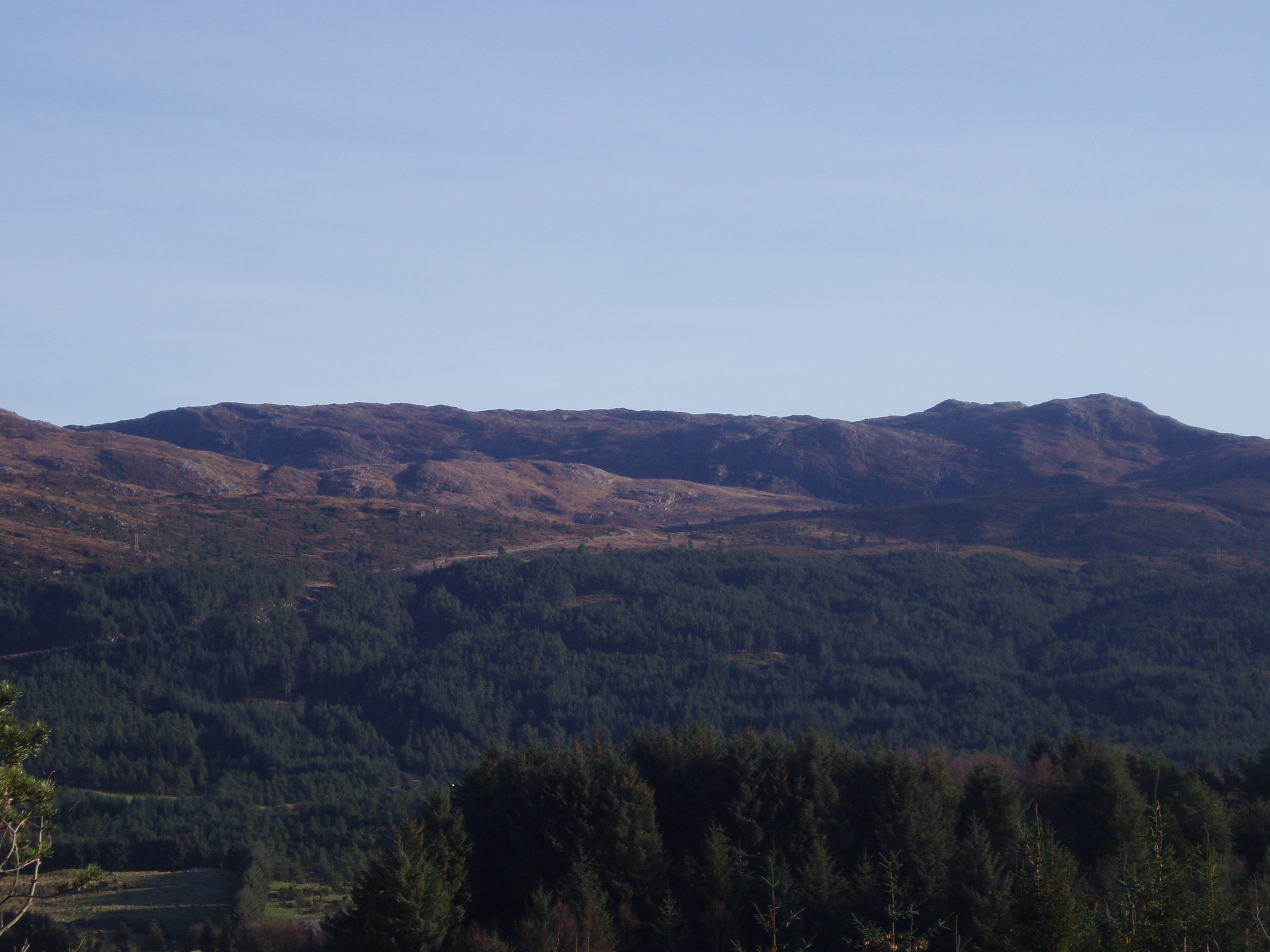 Fitjarfjella og fjellet Kinno (571 moh)